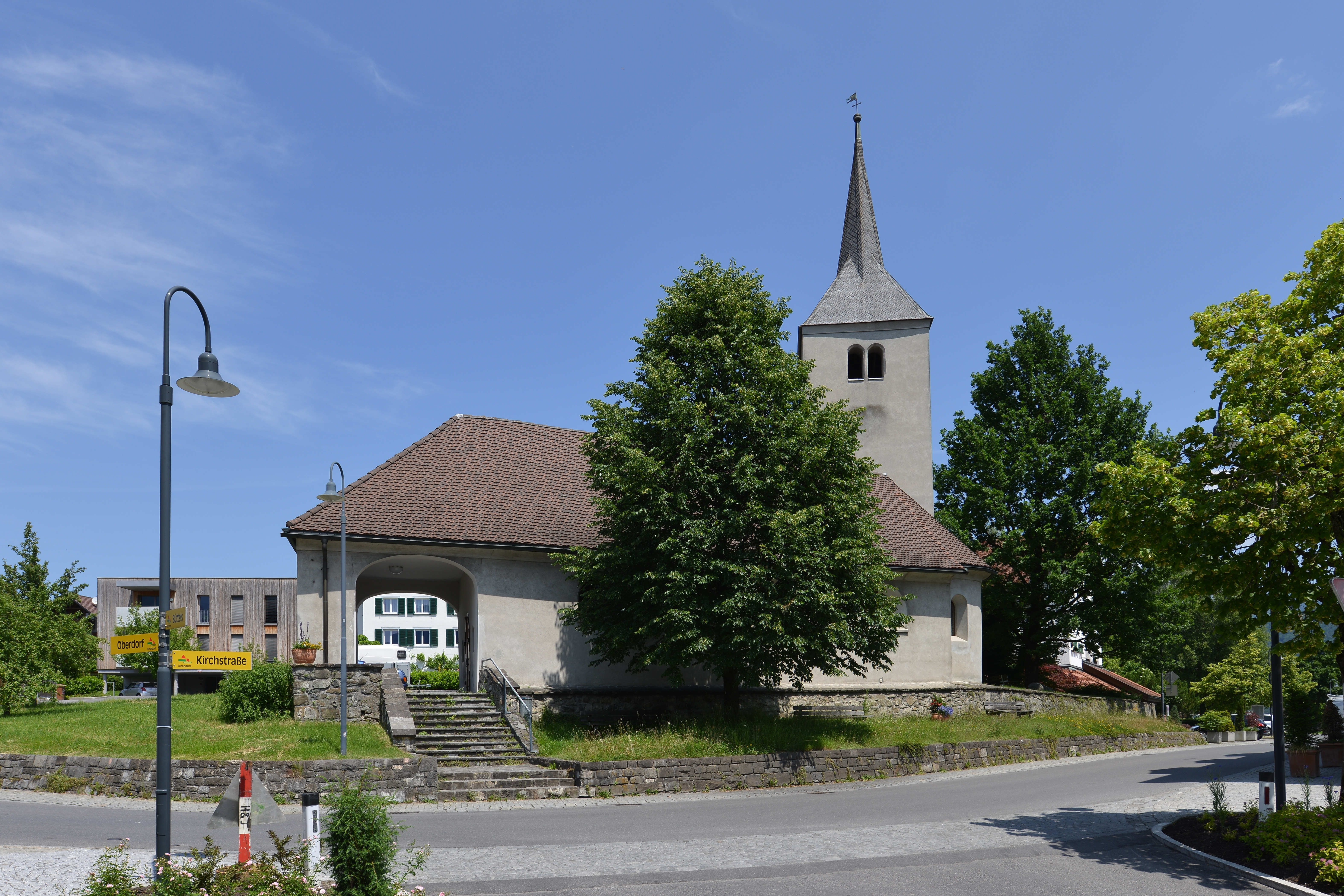 Kapelle hl. Sebastian, in Göfis bei Feldkirch in Vorarlberg.